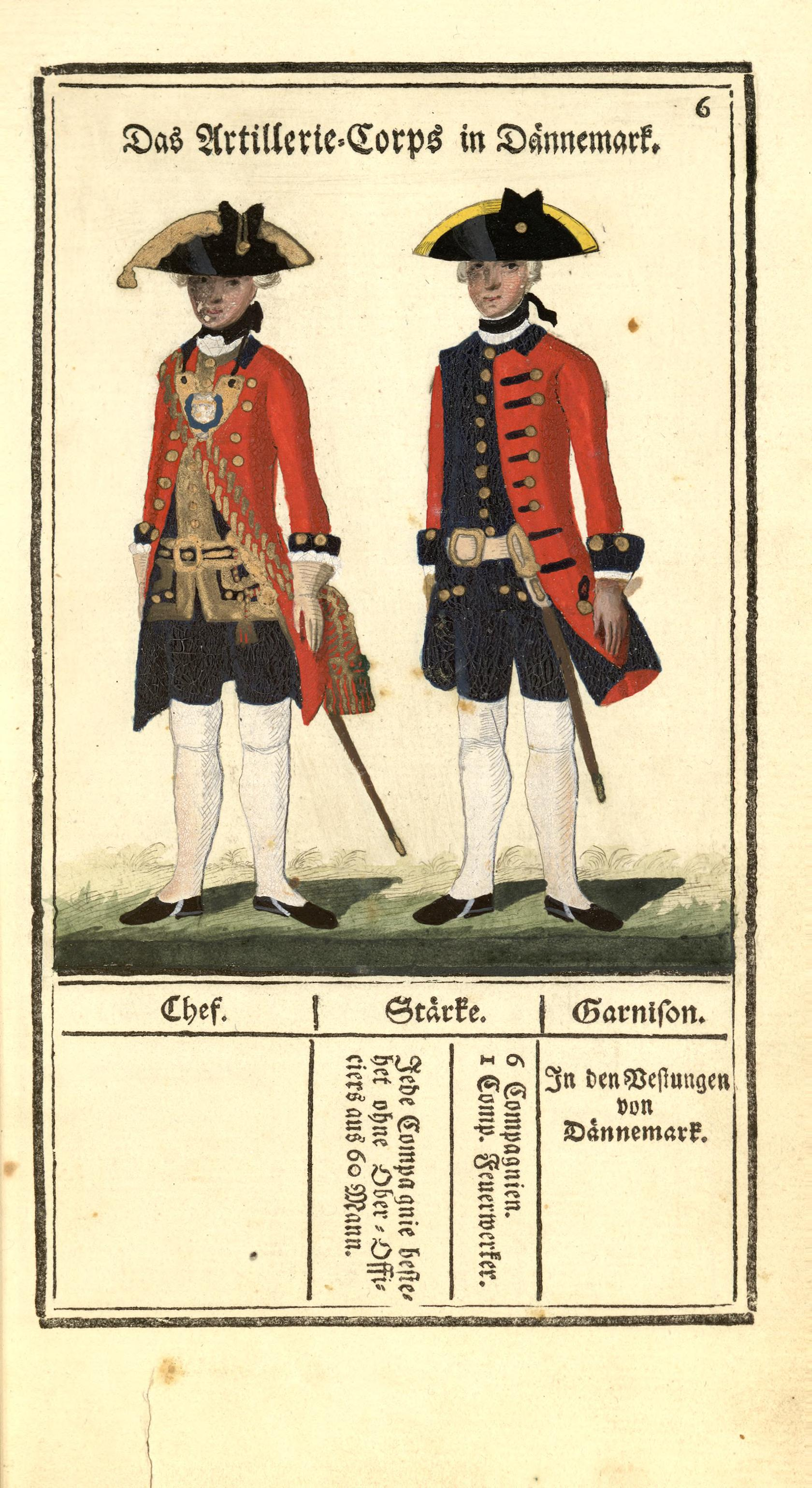 Illustrasjon hentet fra boken "Vorstellung der sämtlichen Königl. Dänischen Armee" av Bertram, Carl og utgitt av Carl Bertram (dk, 1763)